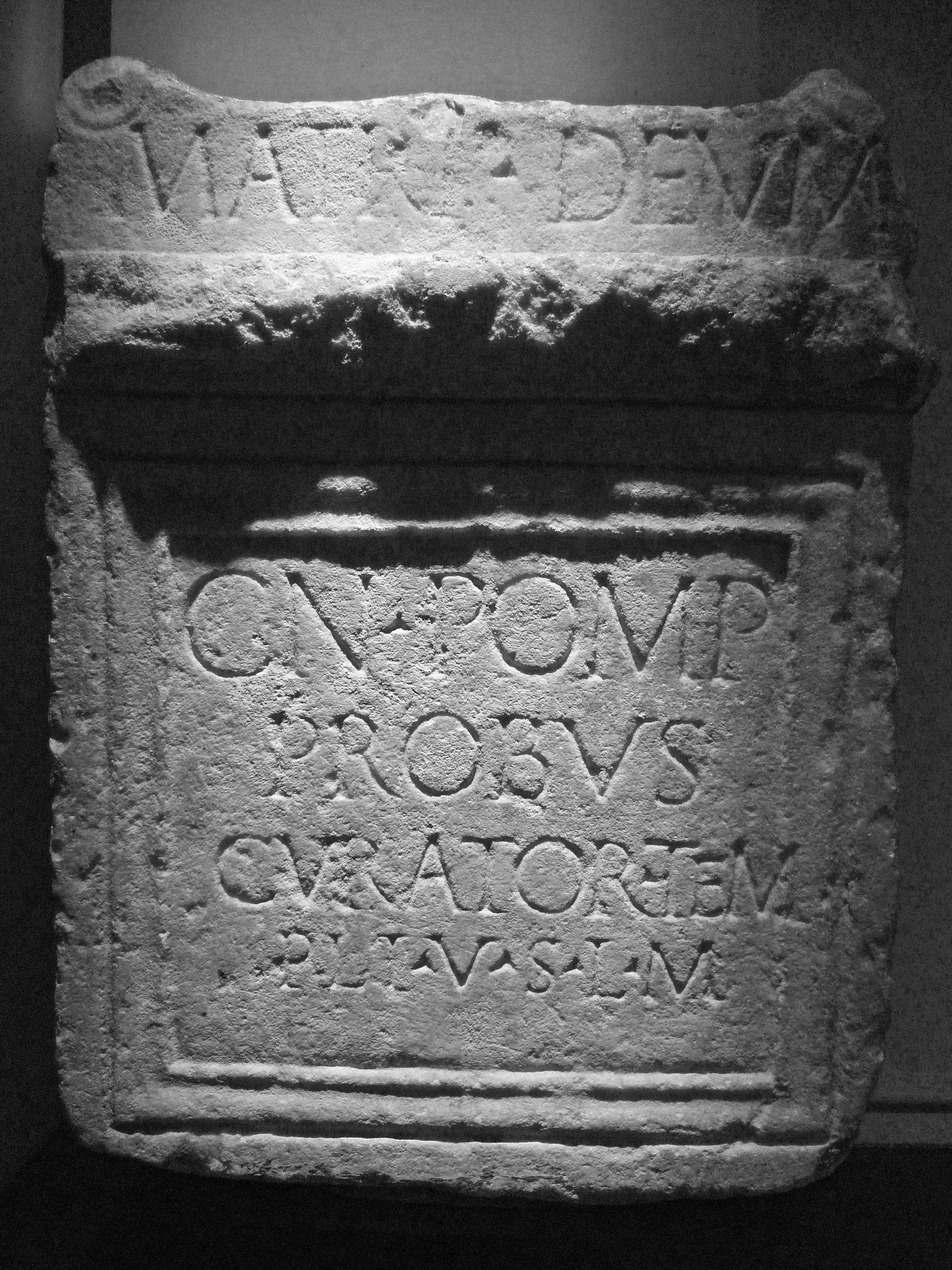 Notice : Autel dédié à Cybèle, mère des dieux. Découvert à Alet (Aude). Ancienne collection du chevalier Rivalz à Toulouse. "Matri Deum / Cn(aeus) Pomp(eius) / Probus / curator tem / pli v(otum) s(olvit) l(ibens) m(erito)." Haut-Empire romain. Référence : CIL XII, 5374 Inv. 31001 Ra 220